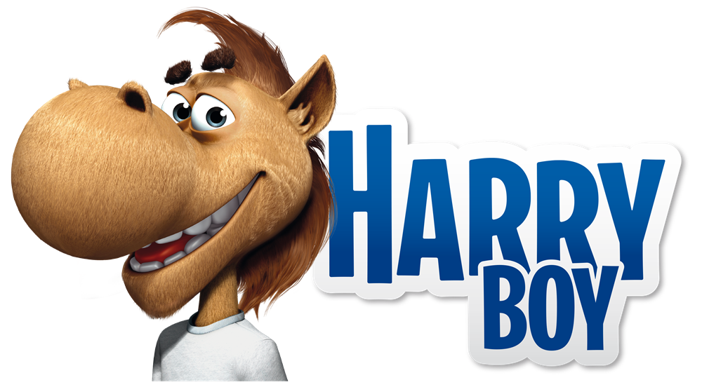 Harry Boy logga - Atg